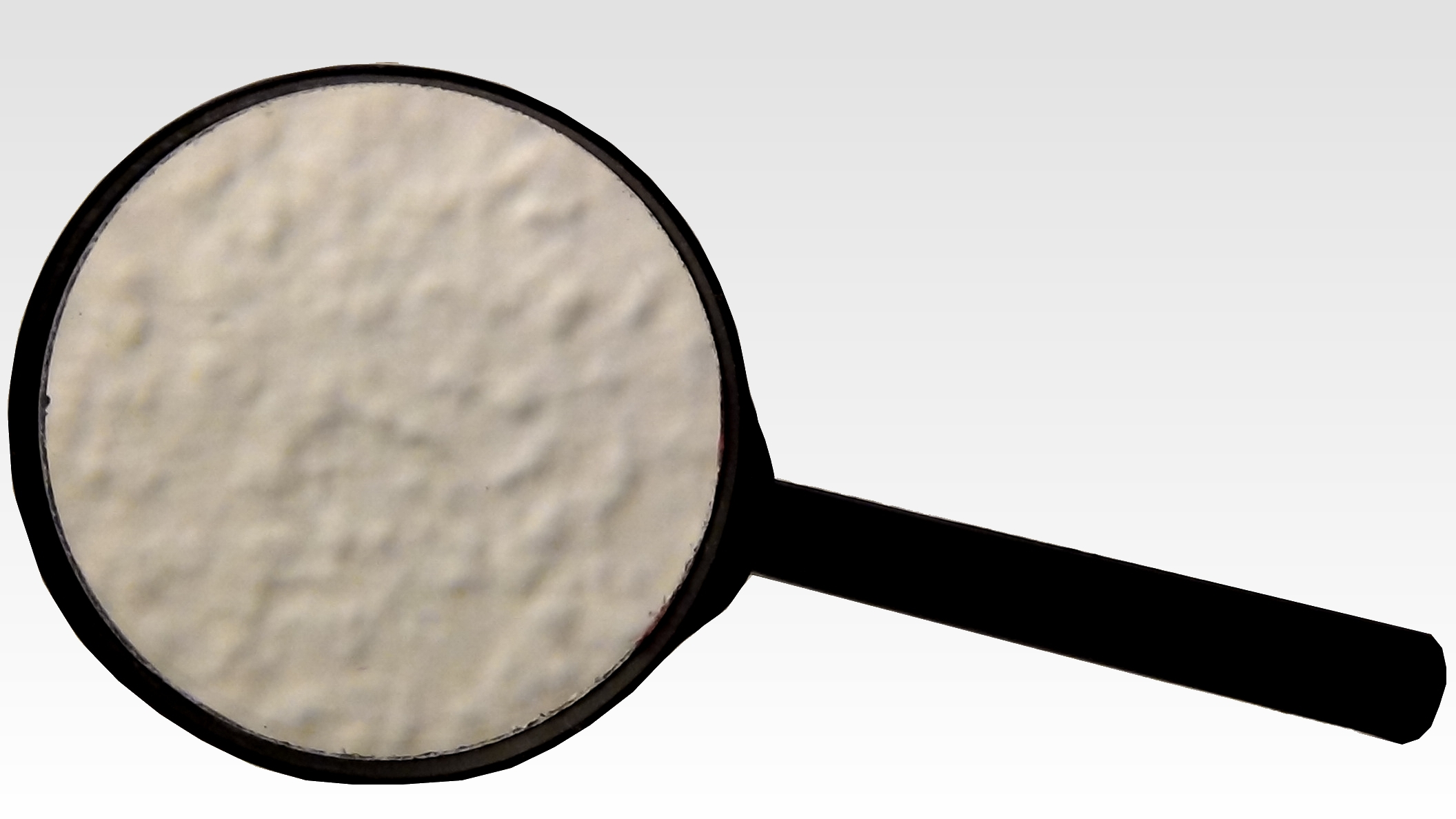 Zdjęcie lupy